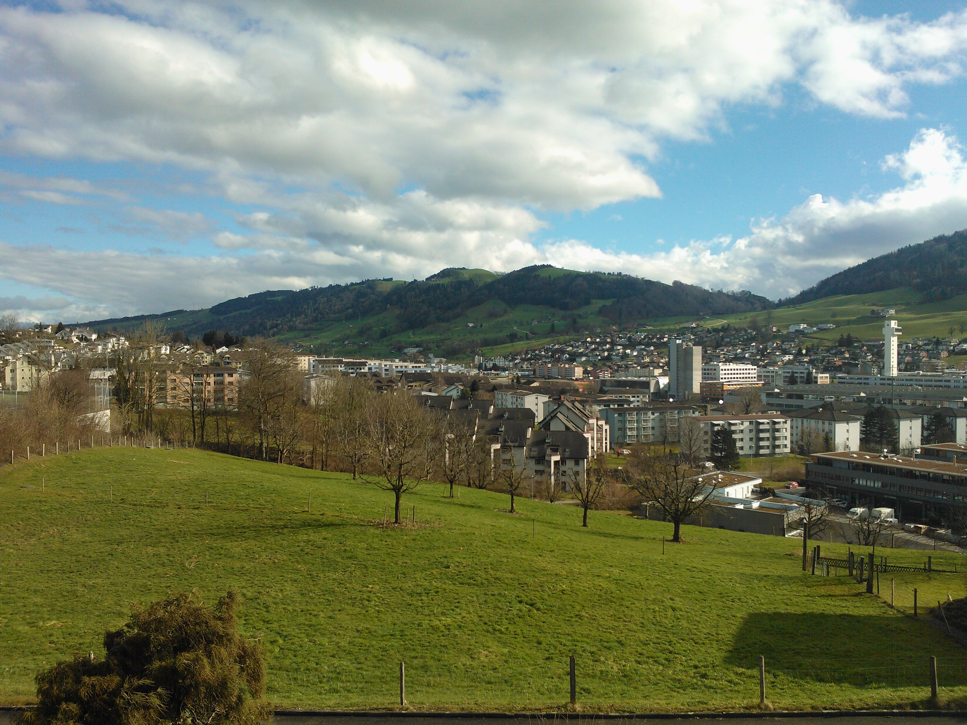 Sicht auf Buchrain, Ebikon, Dierikon und Root (Aufnahme aus Buchrain)